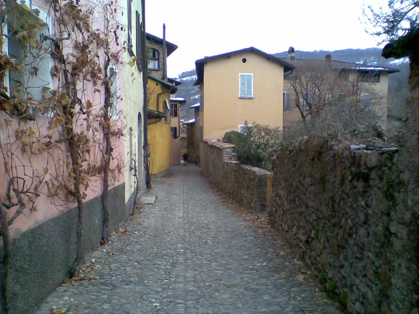 Dicembre 2008 veduta di una viuzza di Origlio Autore Fernando Pescia paco ( dimmi pure)